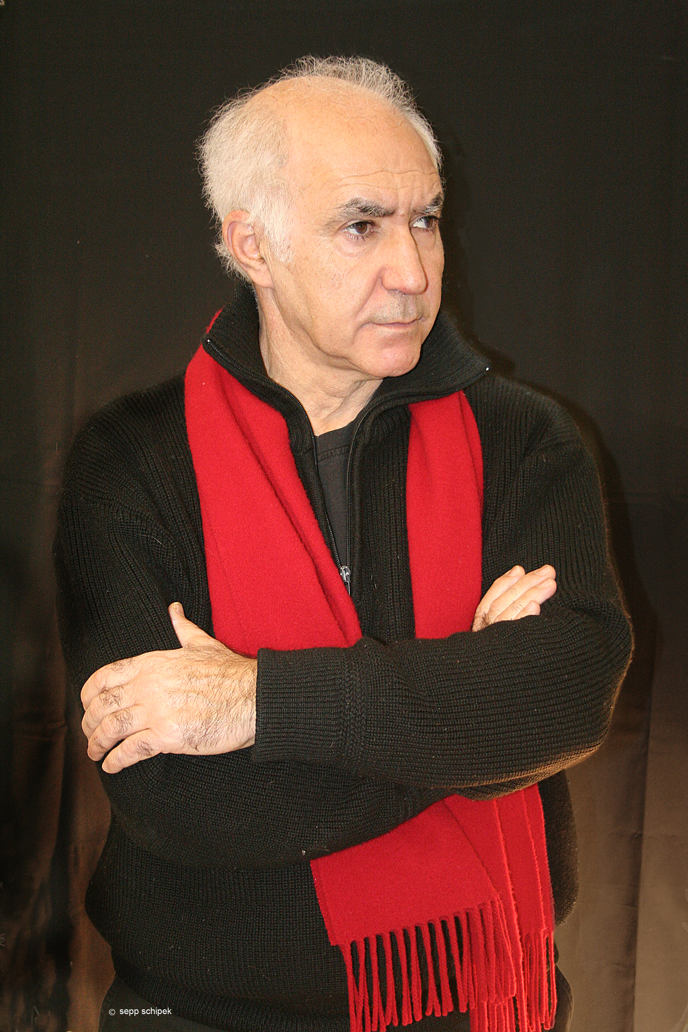 Das Bild zeigt den Künstler Asadur Asadian während seiner Ausstellung "Never Again" im Jahr 2015 in Braunschweig.